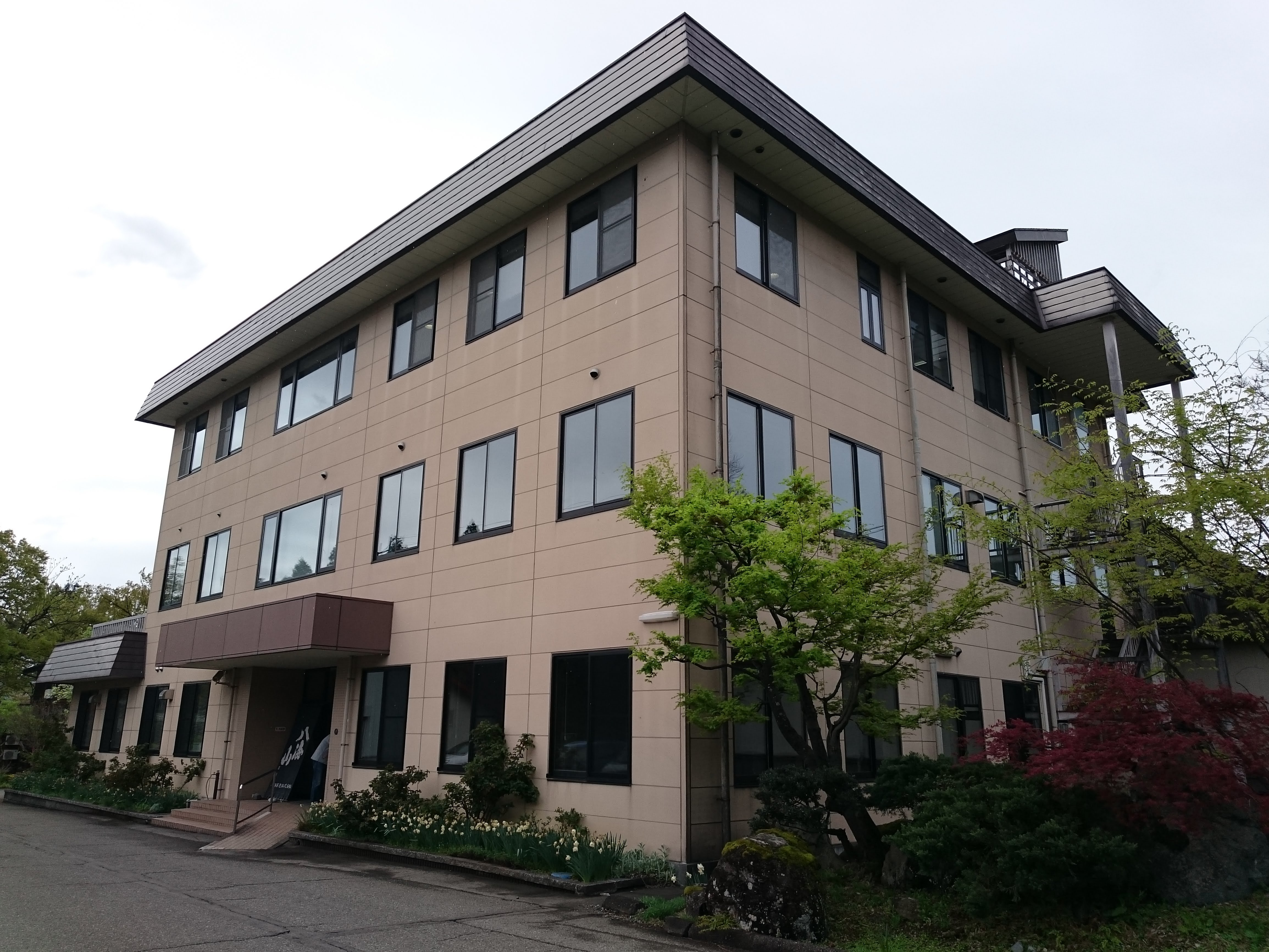 八海醸造の本社建物